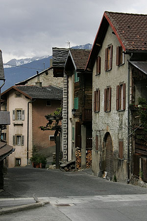 Badnerstrasse in Leuk-Stadt